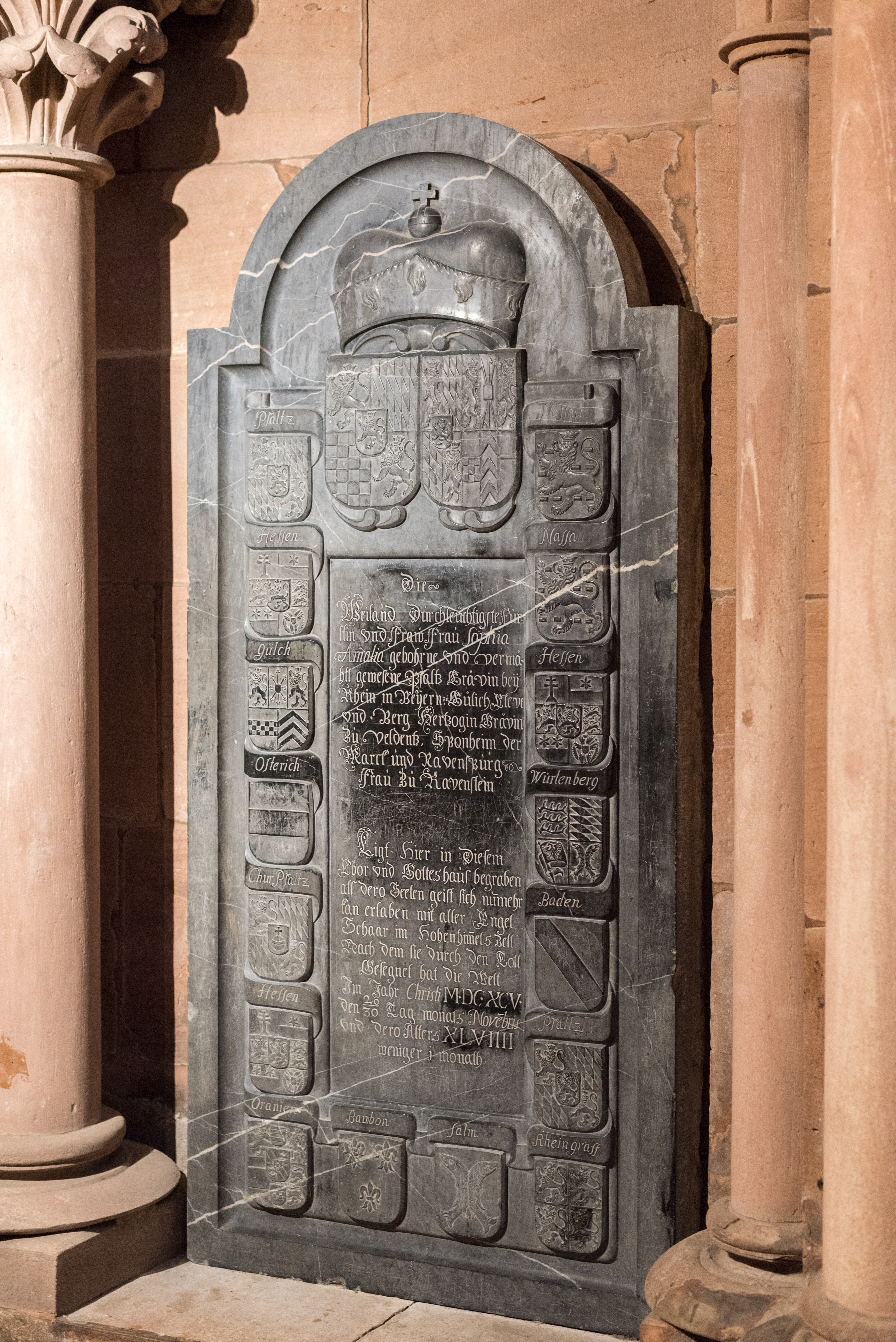 Gelnhausen, Marienkirche, Chor, Epithaph Sophia Amalia geb. Pfalzgräfin bei Rhein (1646-1695)